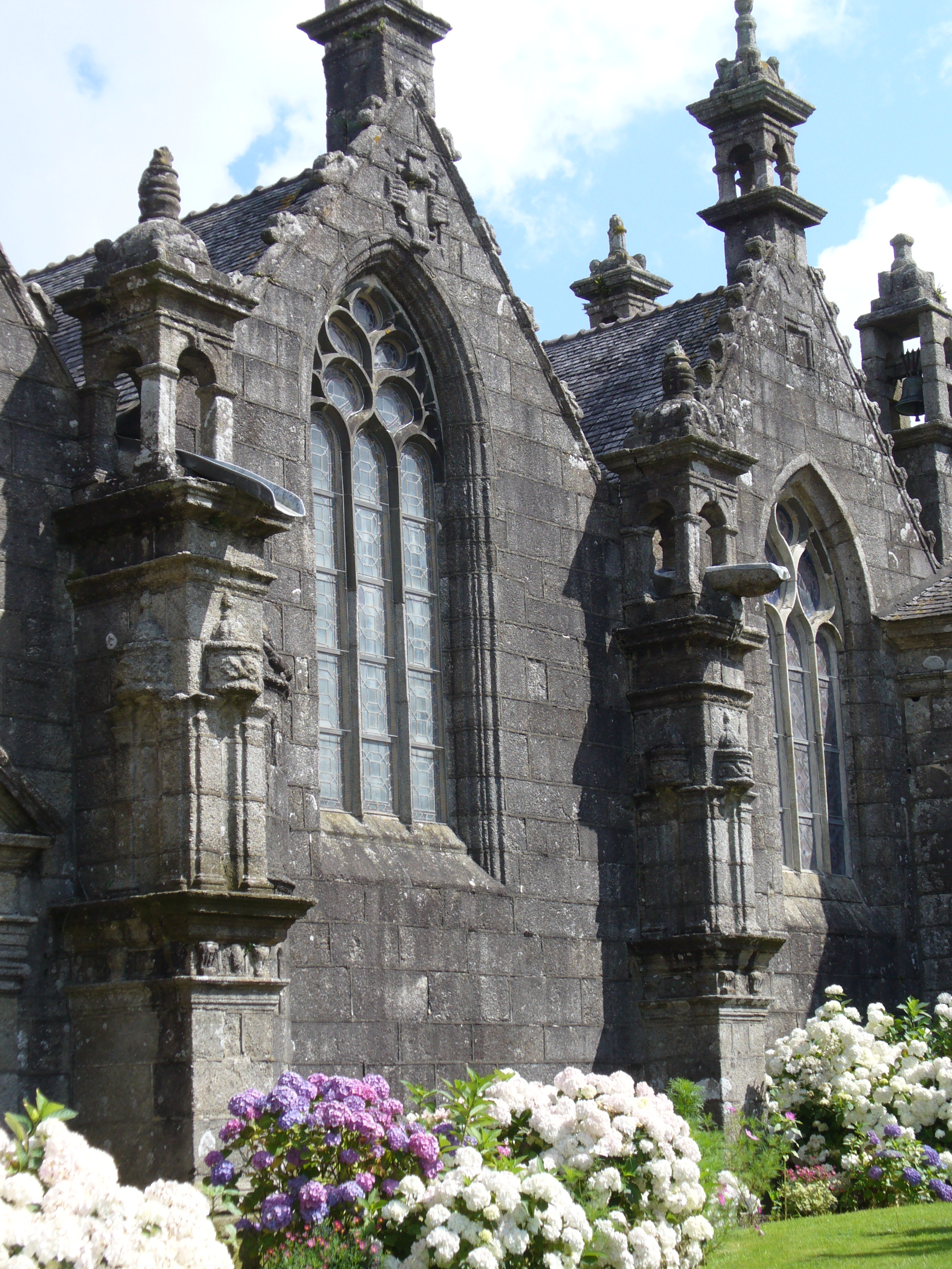 Die zweischiffige Kirche Eglise Saint Miliau(16.Jh.)von Guimiliau Baustil - Übergang vom Flamboyant zur Renaissance aus Granit errichtet-Enclos Paroissal-Umfriedeter Pfarrbezirk